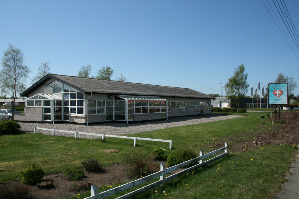 Viborg Internationale Pinsekirke